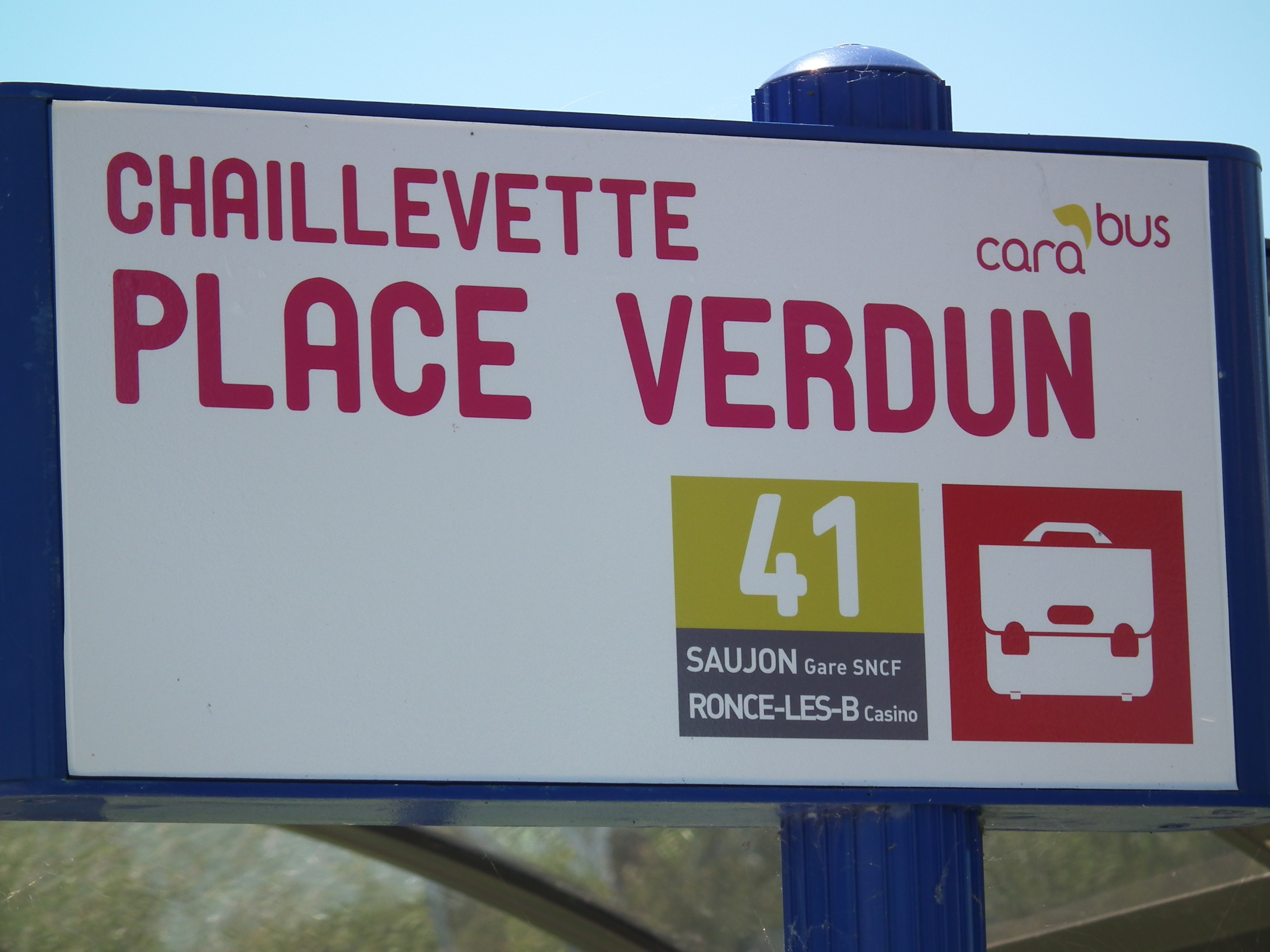 Station de bus à Chaillevette